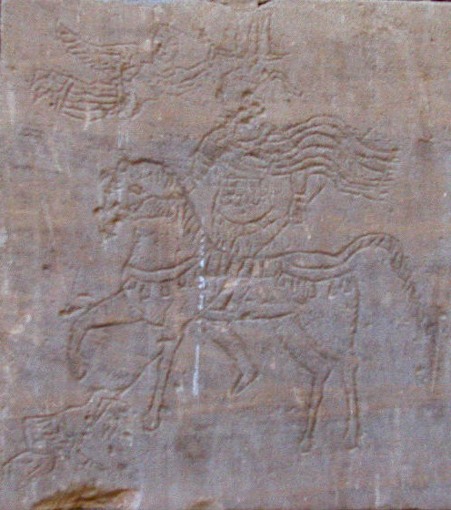 Silko na koni vyobrazen na sloupu v chrámu v Kalabše. Zatímco kopím sráží k zemi Blemmje, je současně korunován.